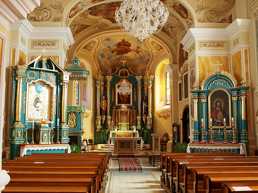 Kościół w Lipinkach.